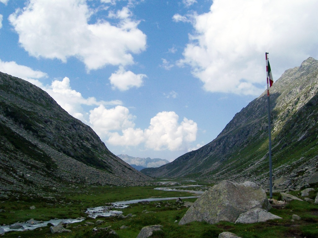 Val Adamé, Val Camonica, Italia